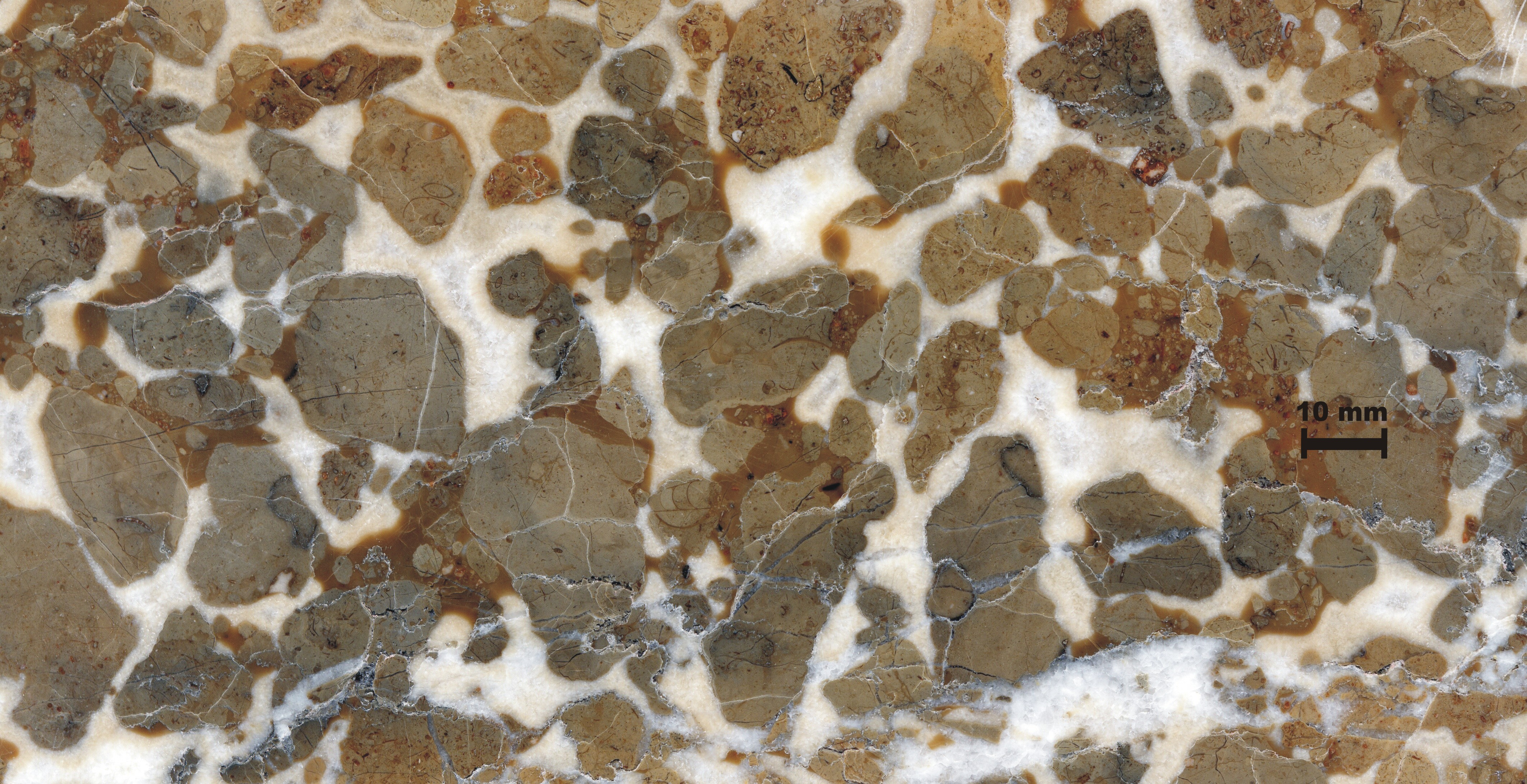 sparitische Zementation in einer Kalkbrekzie von Adnet / Salzburg (Österreich)